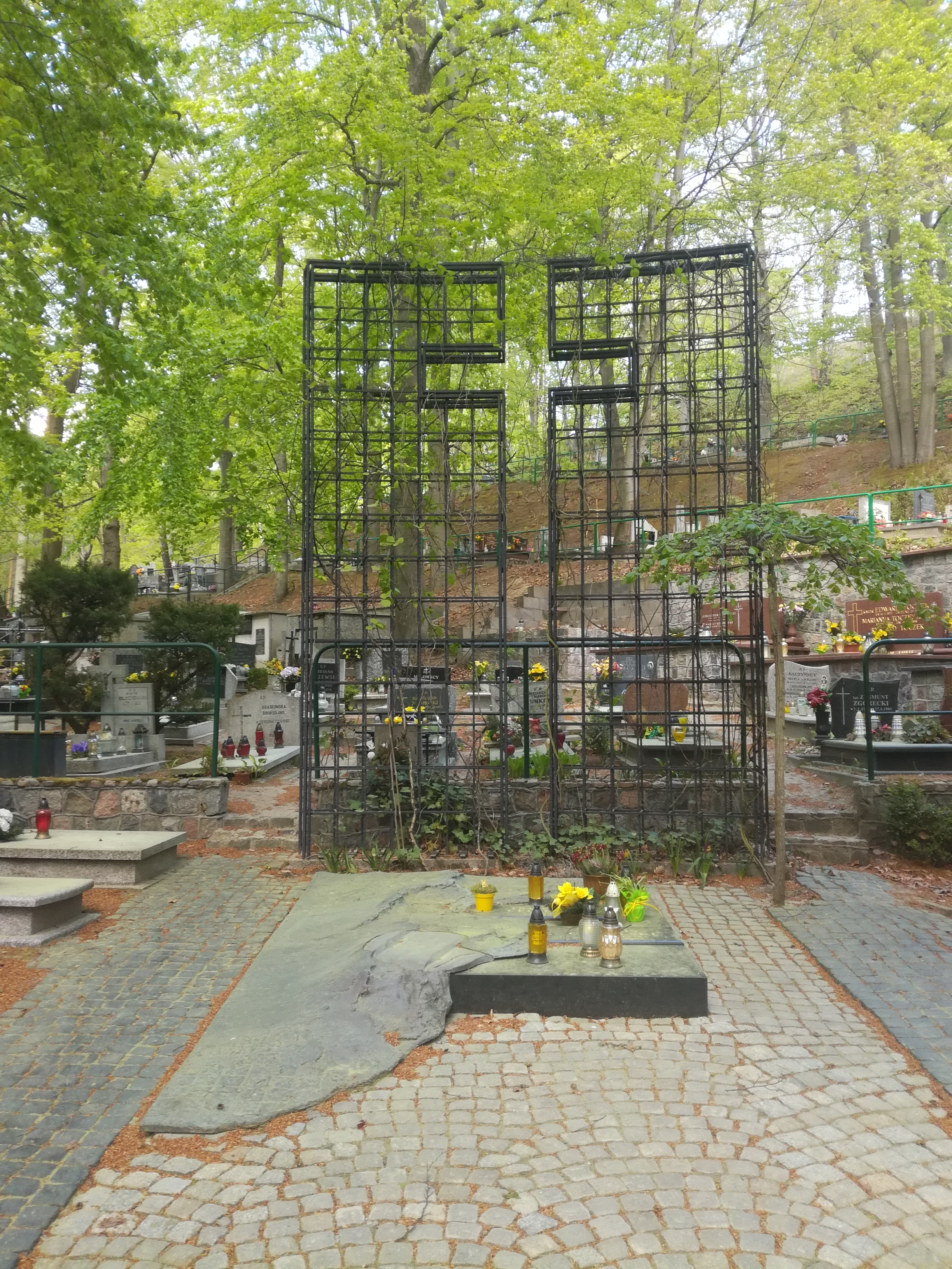 grób Franciszki Cegielskiej na Cmentarzu Witomińskim